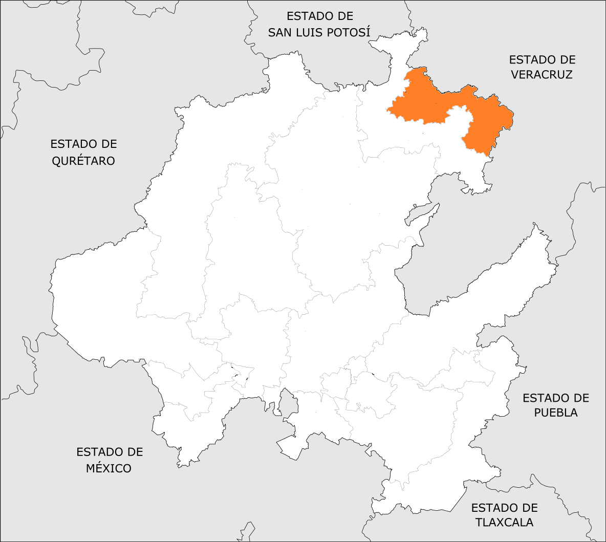 Distrito Electoral Local de Hidalgo 04